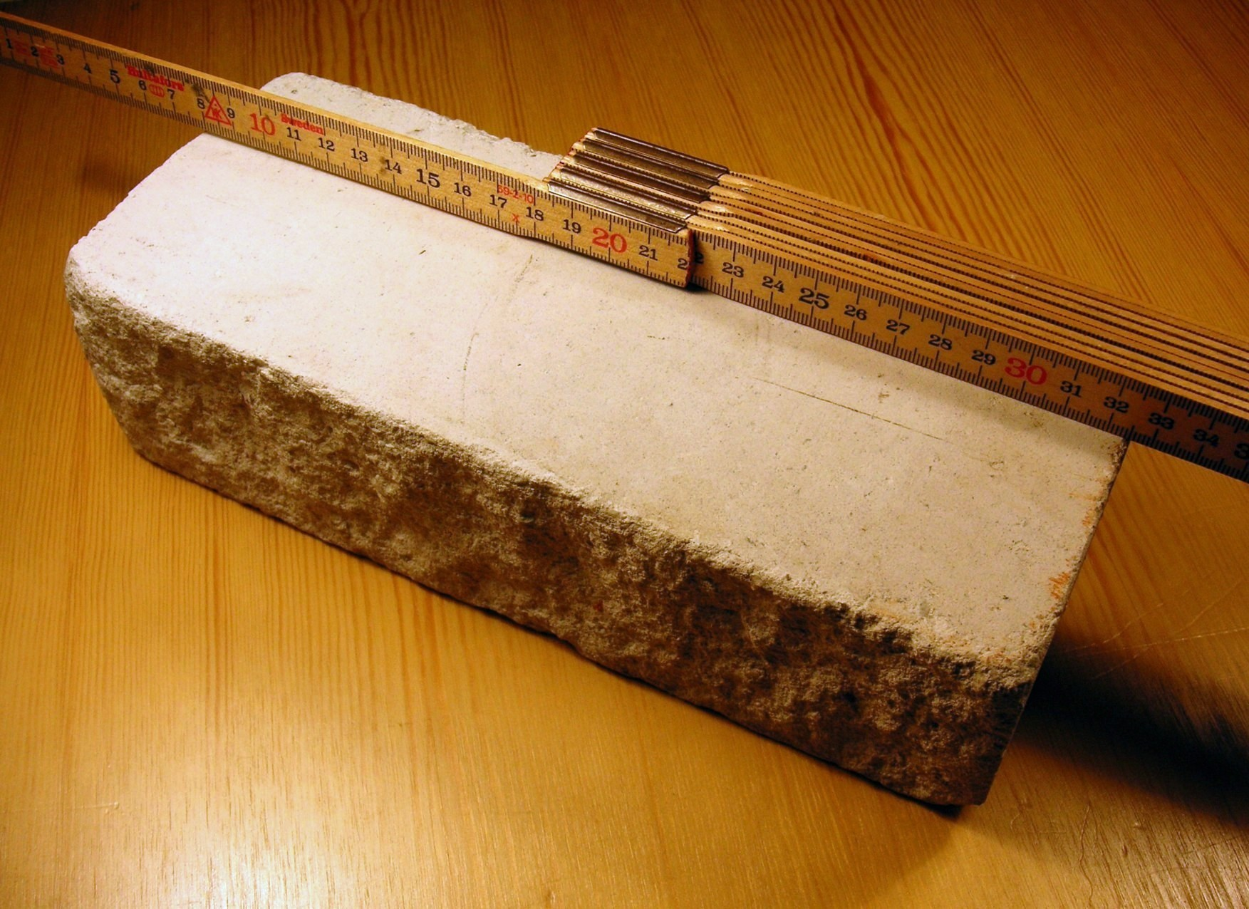 Mexitegel, huggen Mexitegel